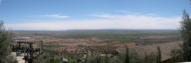 Fotografia realizada desde el Mirador de la Mancha Imagen propiedad de David Carrero Fernández-Baillo. Copyright 2004 David Carrero Fernández-Baillo